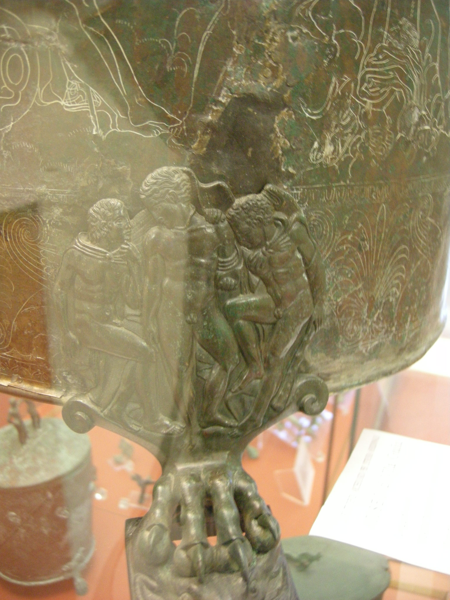 Cista Ficoroni, dettaglio con Ercole (a destra) a colloquio con due giovani, forse Ila ed Eros.